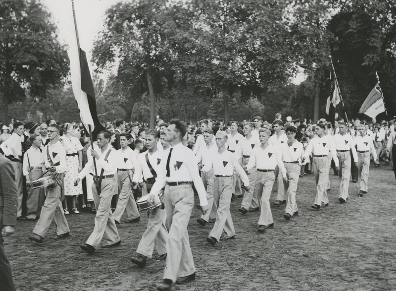 Een burgergroep defileert tijdens de (eerste) vlaggenparade op de Wedren op de maandagavond voor de 28e Vierdaagse.